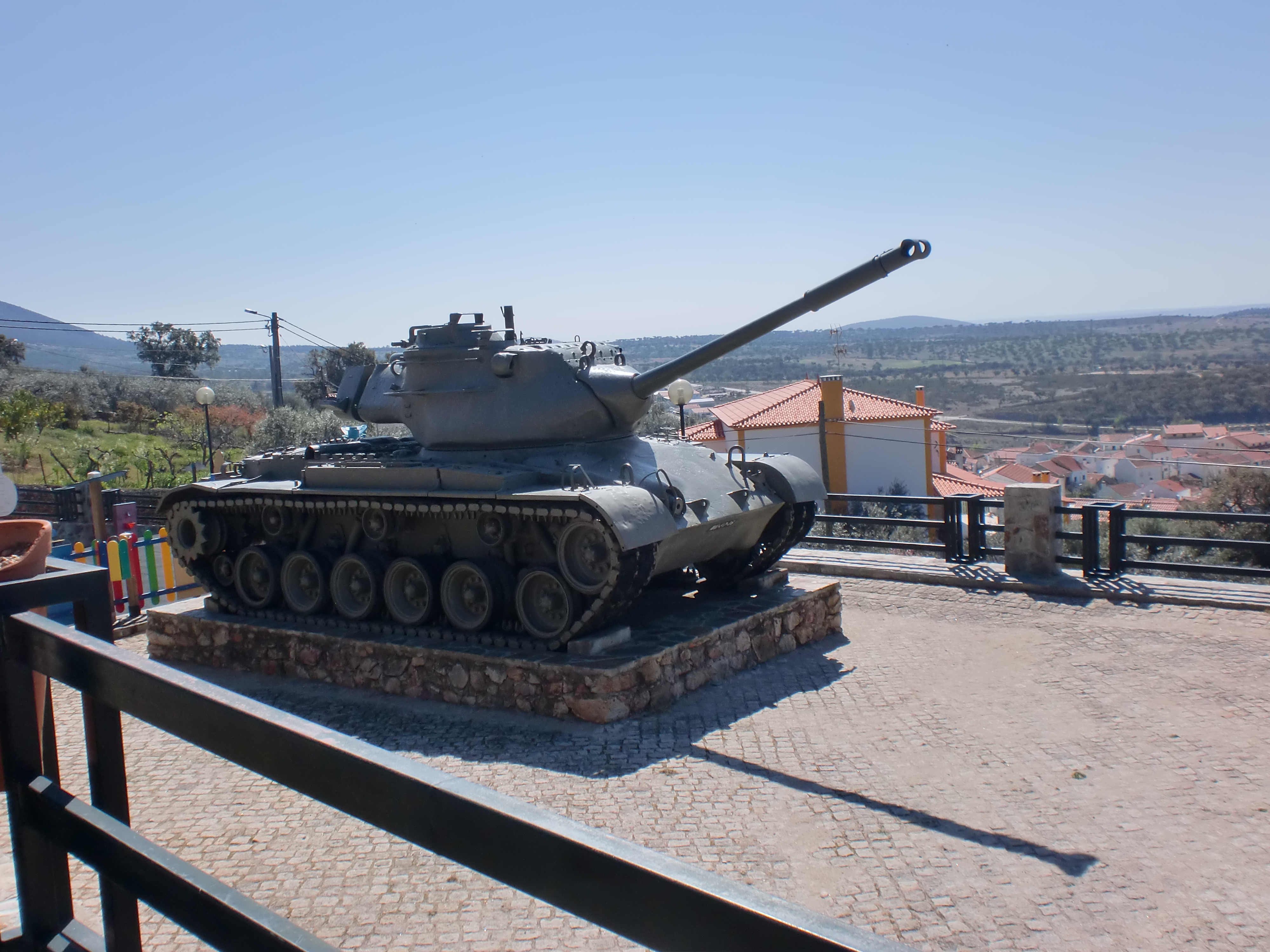 M47 Patton em exposição no Largo do Chão da Igreja, em Penha Garcia. Este modelo foi um dos utilizados na Revolução dos Cravos. Reportagem da SIC sobre este mesmo tanque de guerra em Penha Garcia.